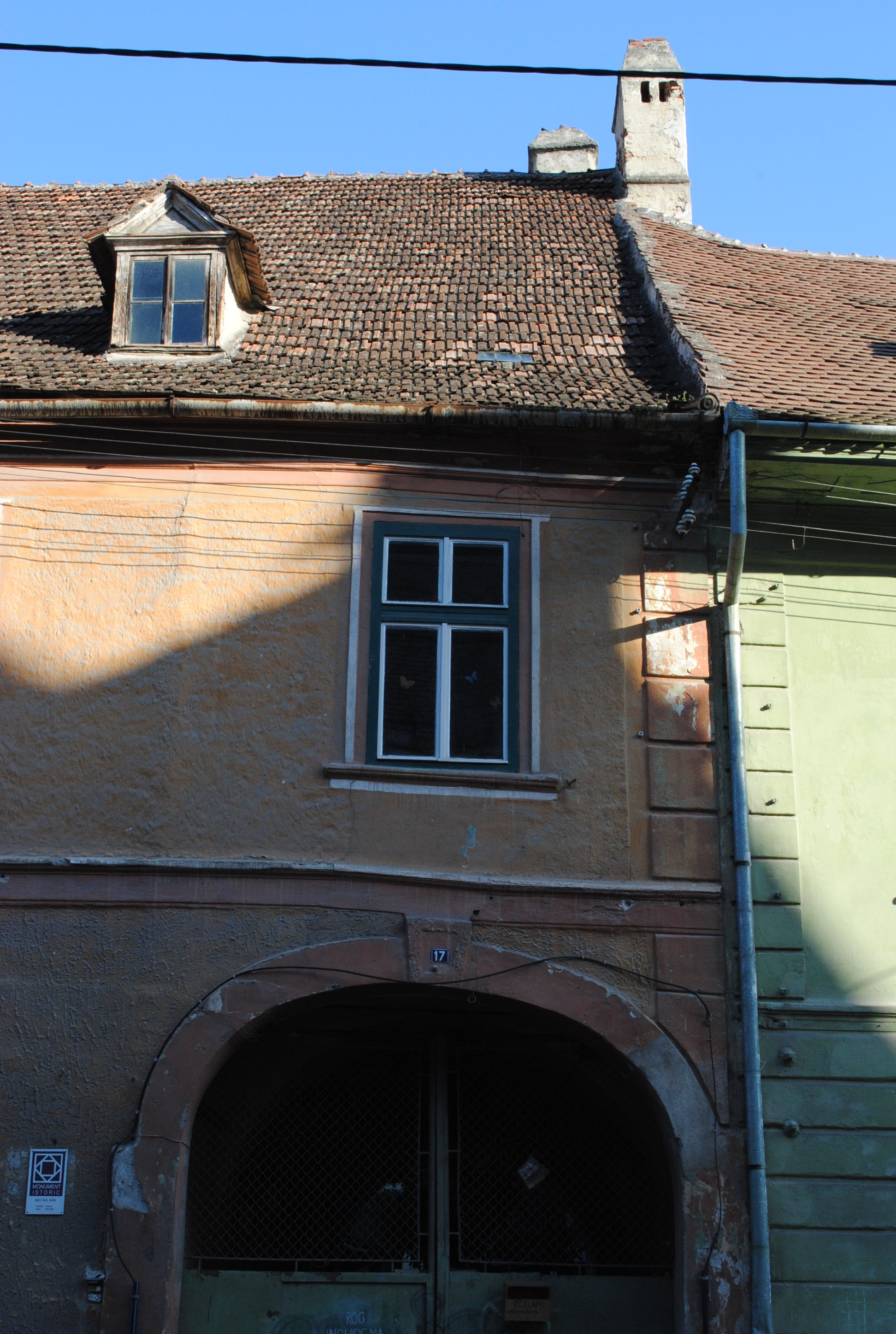 Casă, sec. XVI,1750 - 1800